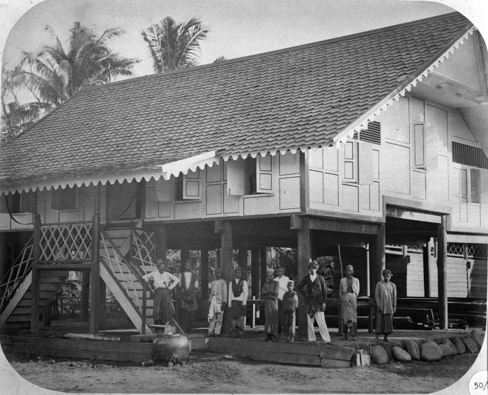 Foto. De woning van het Atjehse hoofd Toekoe Kali te Koetaradja in Atjeh Noord Sumatra, een der eerste Atjehse hoofden die zich onder gezag van het Nederlands bestuur plaatste.